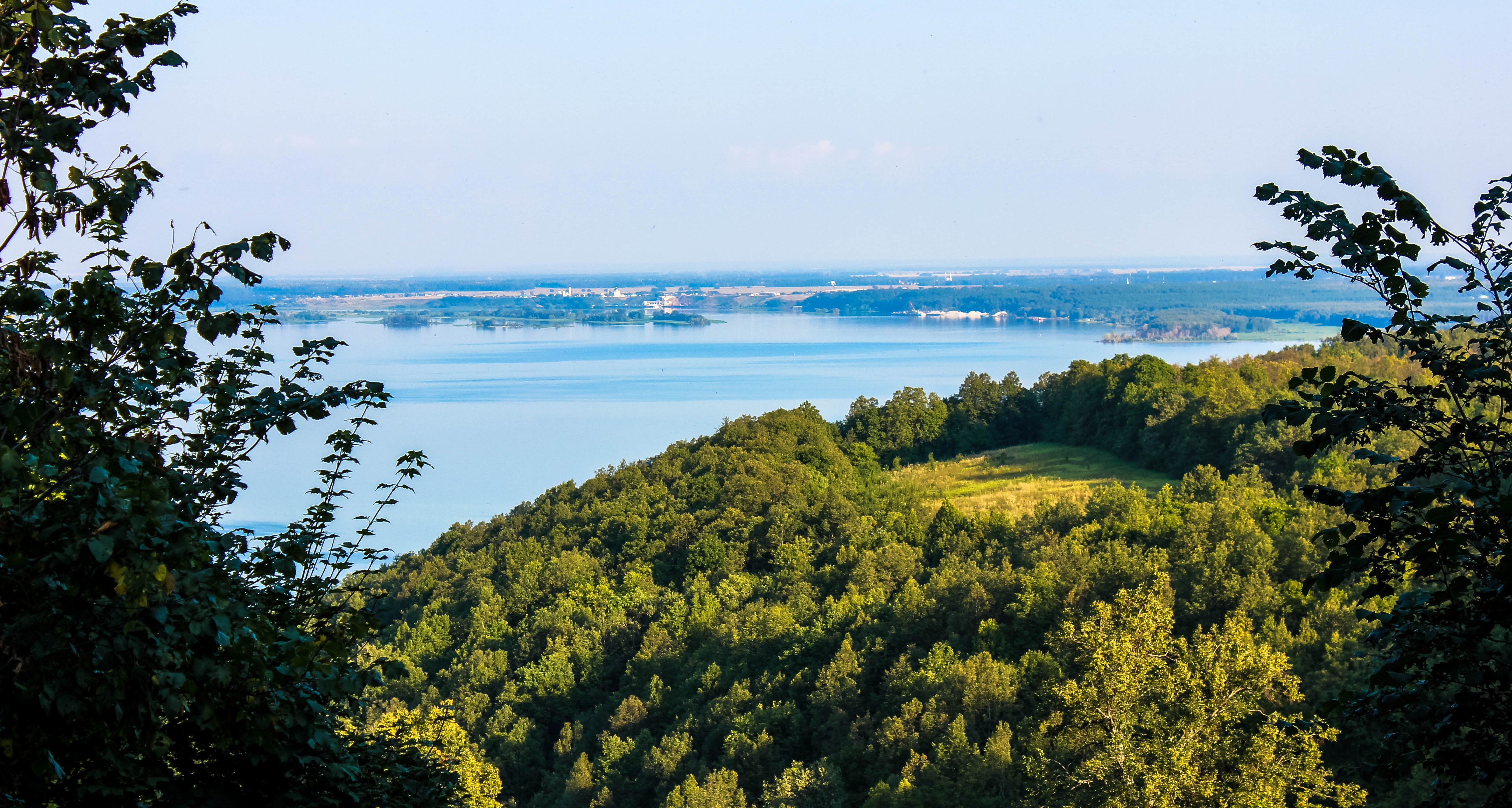 Тетюшский заказник, Тетюшский район This image is related to the protected area of Russia number 1610170